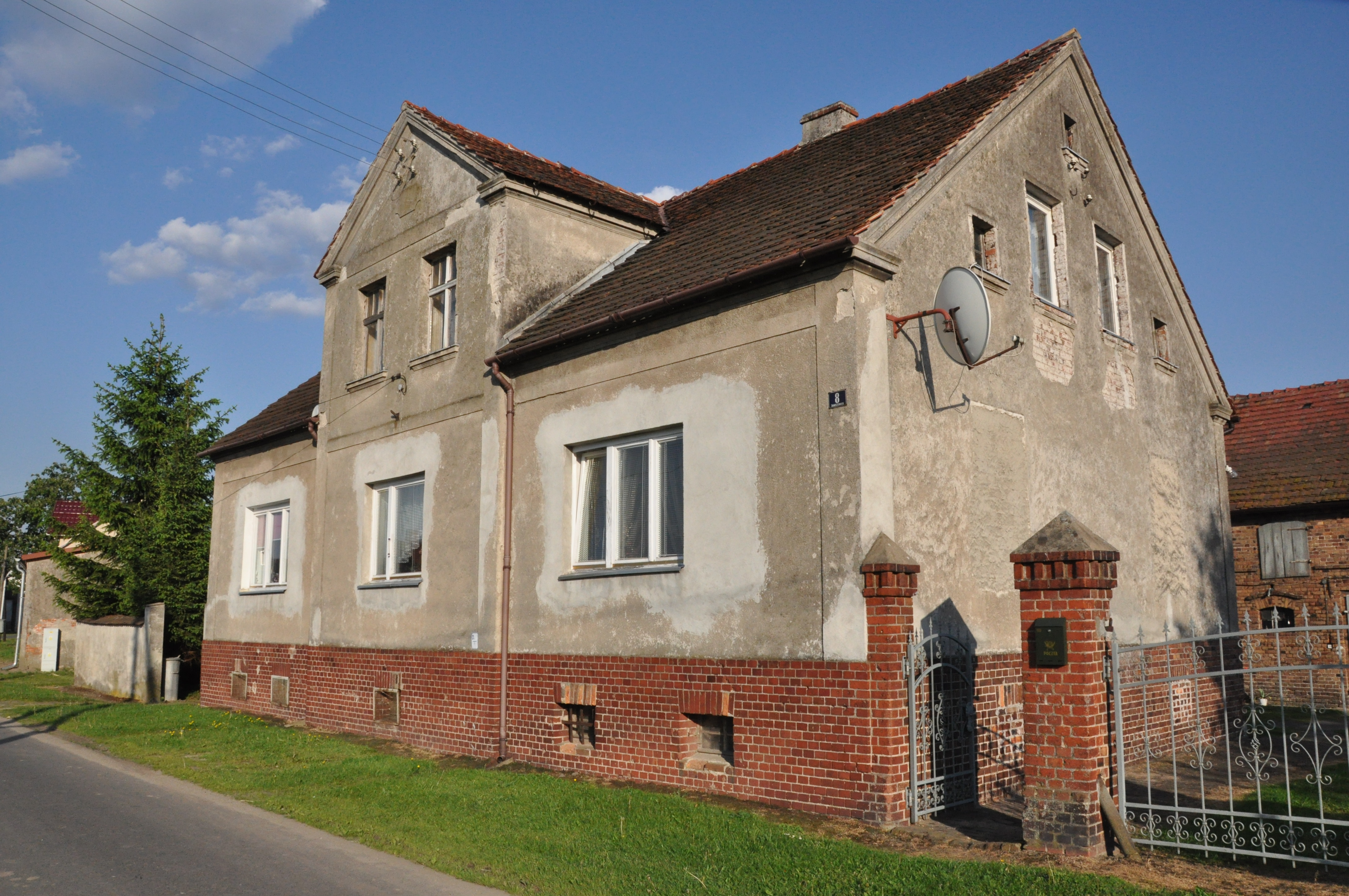 Była strażnica WOP w Janowie (Janiszowicach)